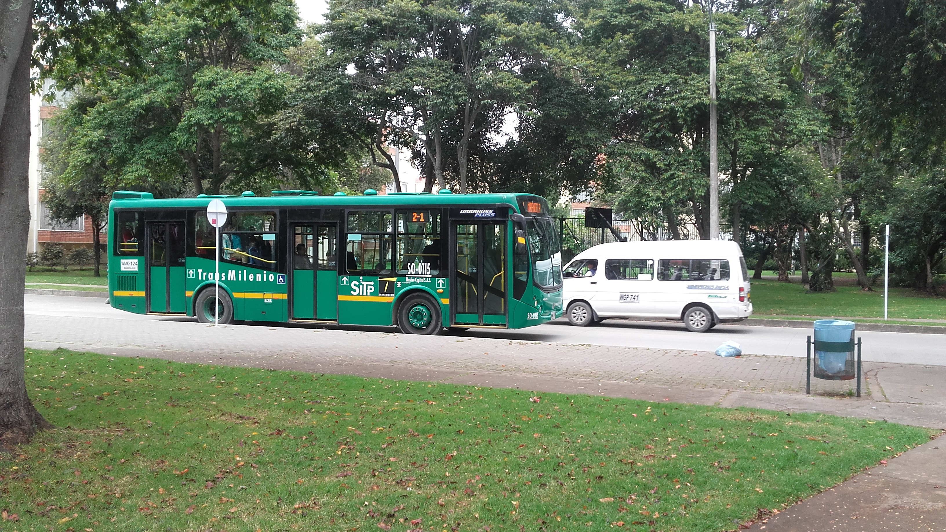 mendmdmdmd